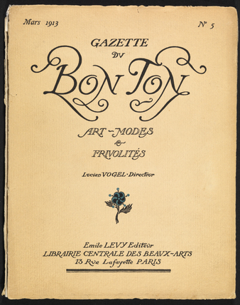 Gazette du Bon Ton cover